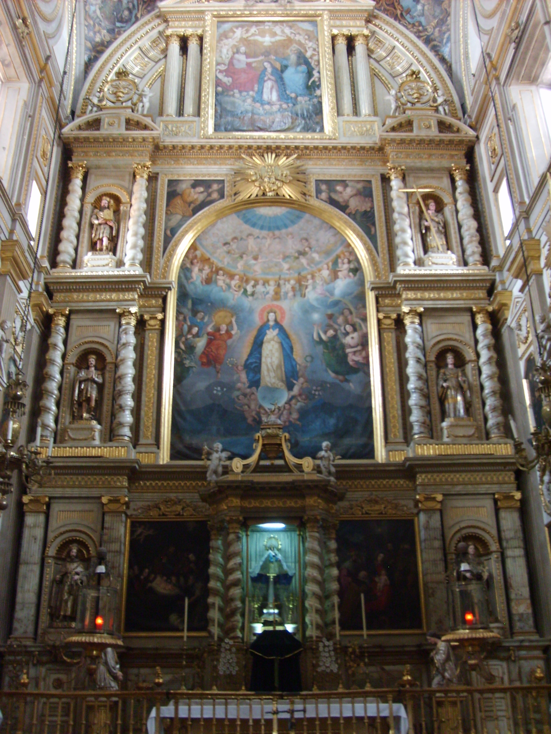 Retablo del Altar de los Reyes, Catedral de Puebla.